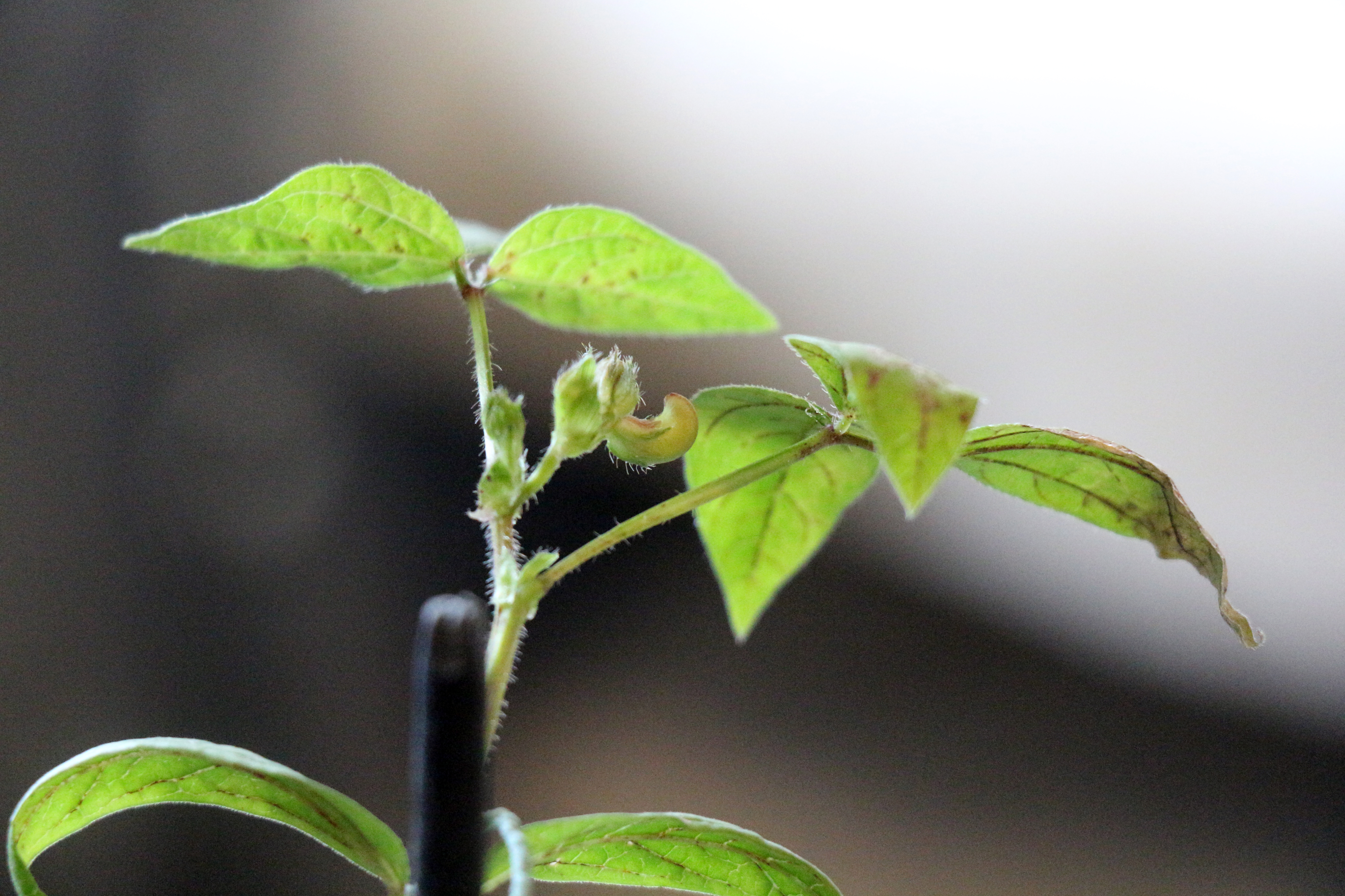 Nahaufnahme der Knospen